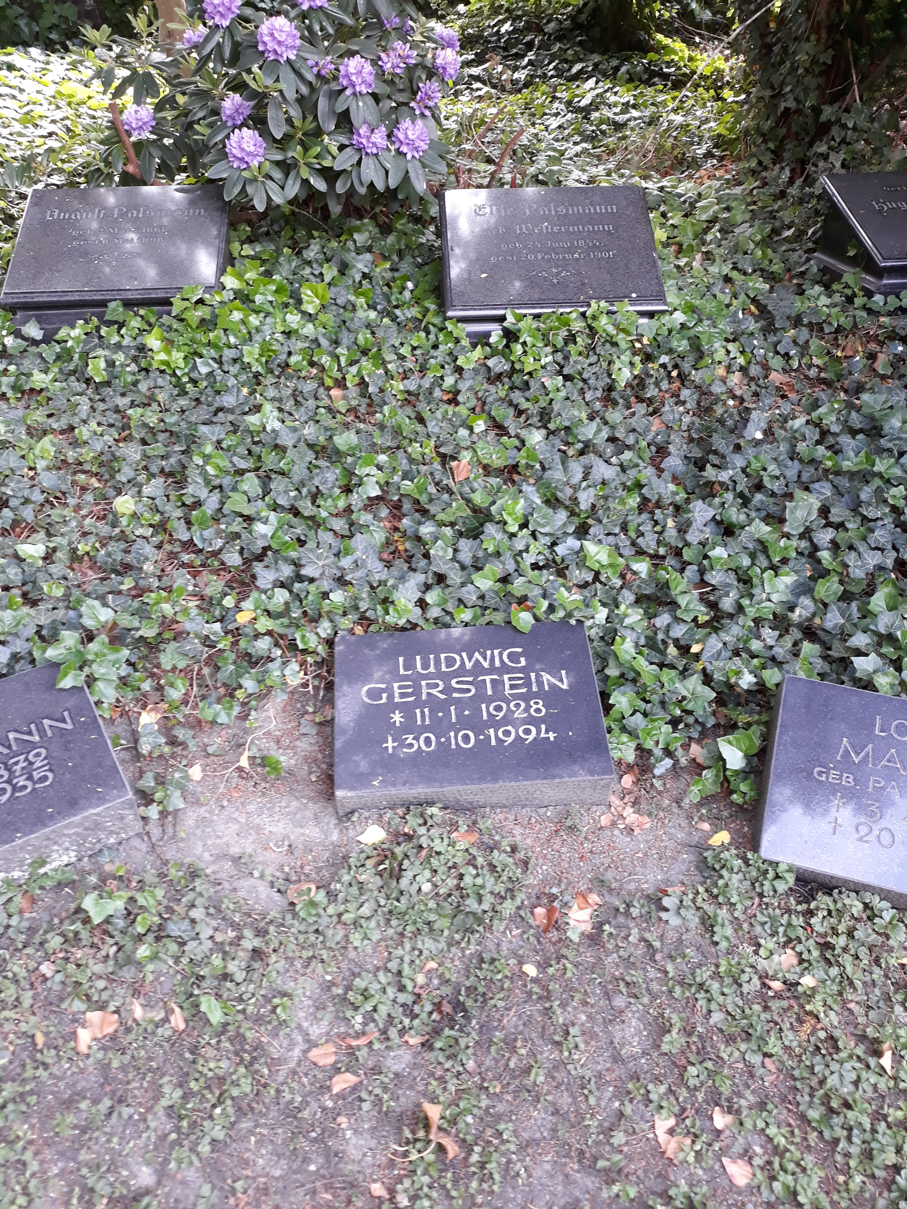 Das Grab des deutschen Politikers (CDU) Ludwig Gerstein im Familiengab Passmann auf dem Friedhof Dortmund-Oespel.